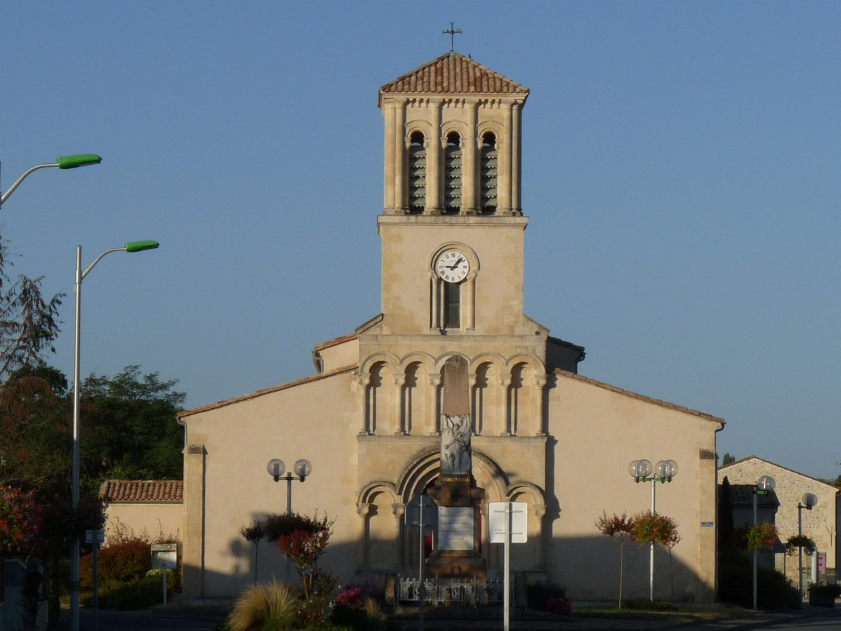 église de Grayan, Grayan-et-l'Hôpital, Gironde, France